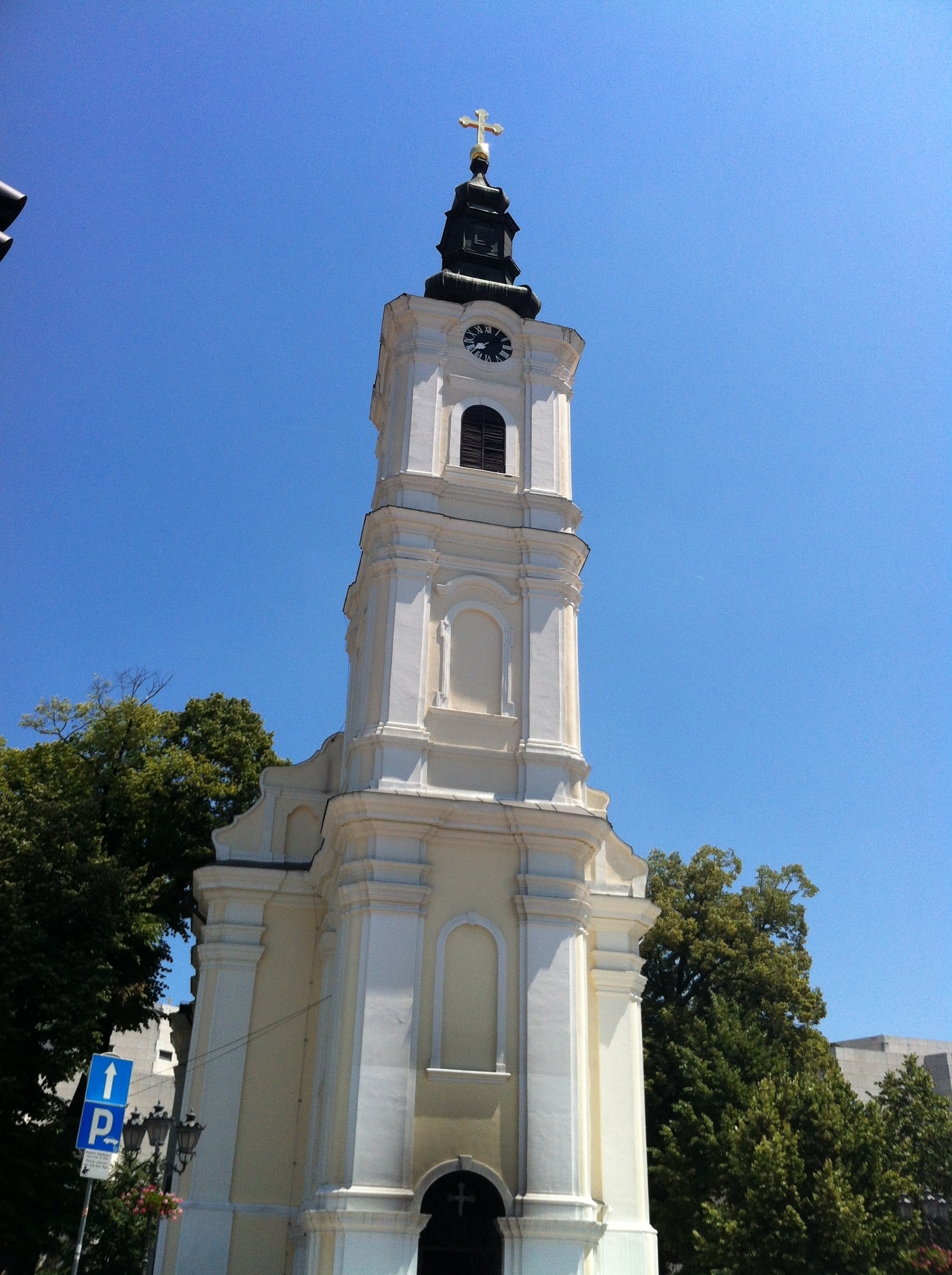 Српски (ћирилица): Прва Успенска црква је била скромнијих димензија а на њено место је саграђена 1765.године садашња црква.